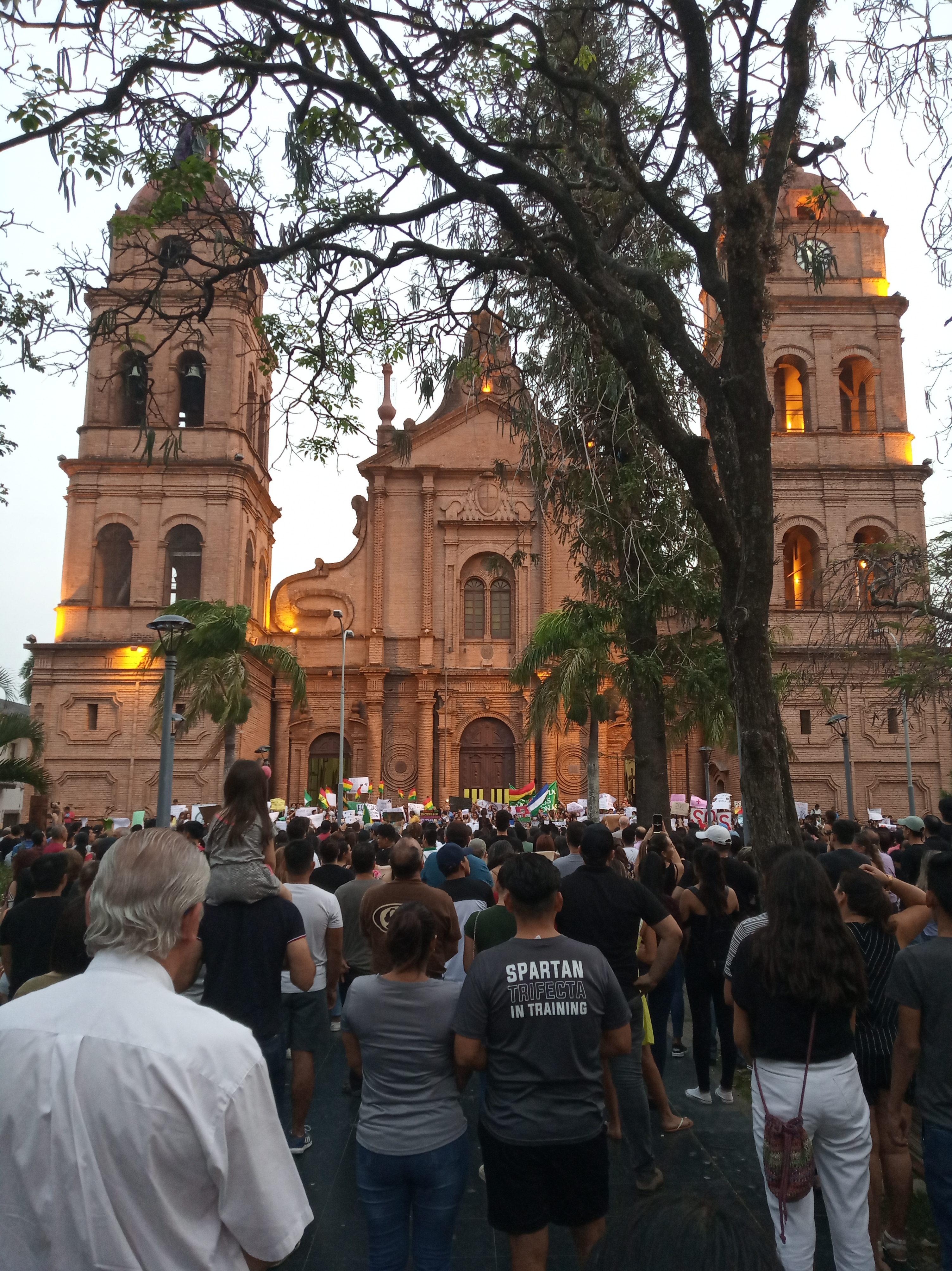 Grupos de ciudadanos en la ciudad de Santa Cruz en manifestación pidiendo ampliar ,medidas para el control de incendios en la Chiquitanía y Amazonía.